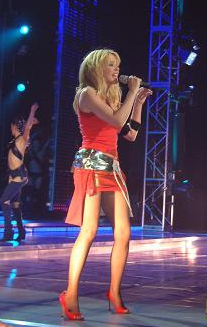 Kylie Minogue en un performance de su único concierto "Money Can´t Buy", con el apoyo de su álbum de estudio "Body Language".